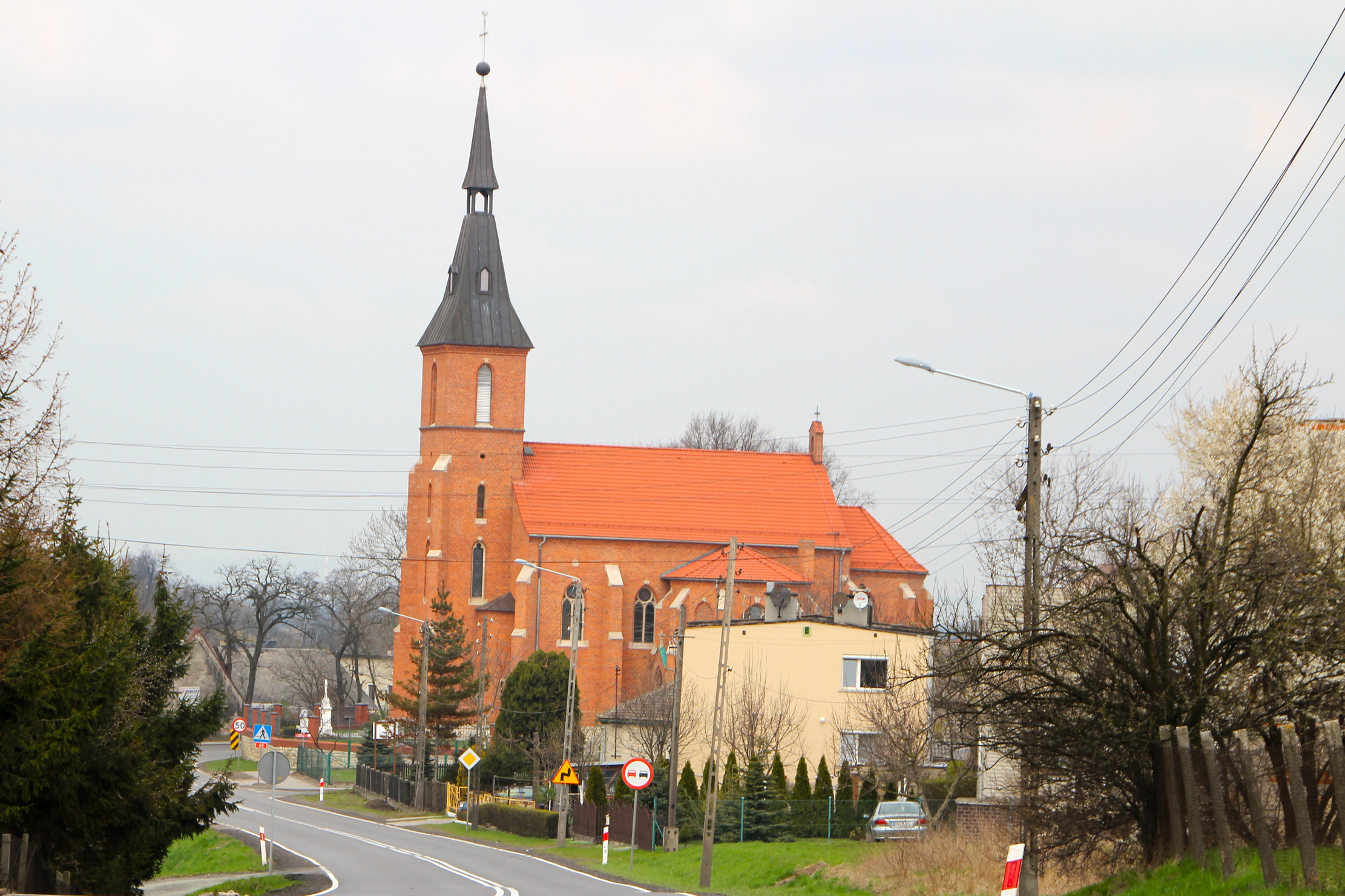 Długomiłowice (dodatkowa nazwa w j. niem. Langlieben) – wieś w Polsce położona w województwie opolskim, w powiecie kędzierzyńsko-kozielskim, w gminie Reńska Wieś.